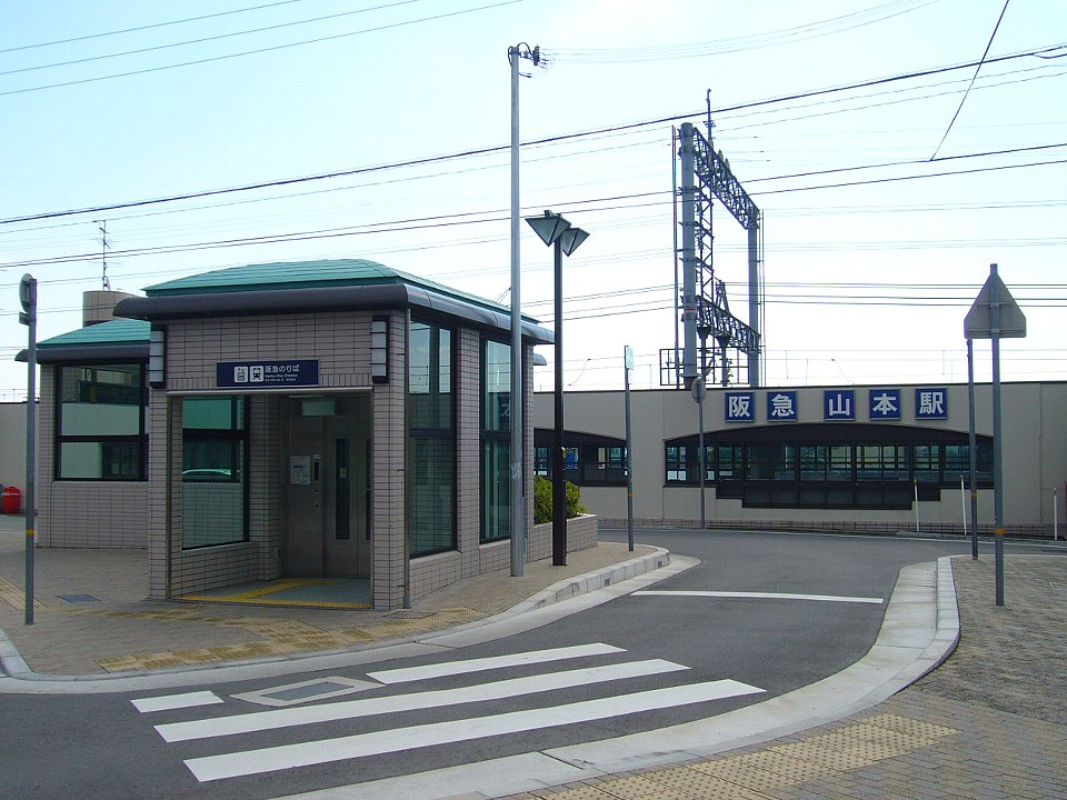 阪急宝塚本線山本駅 北口 手前の階段・エレベータからホーム下の改札に入る